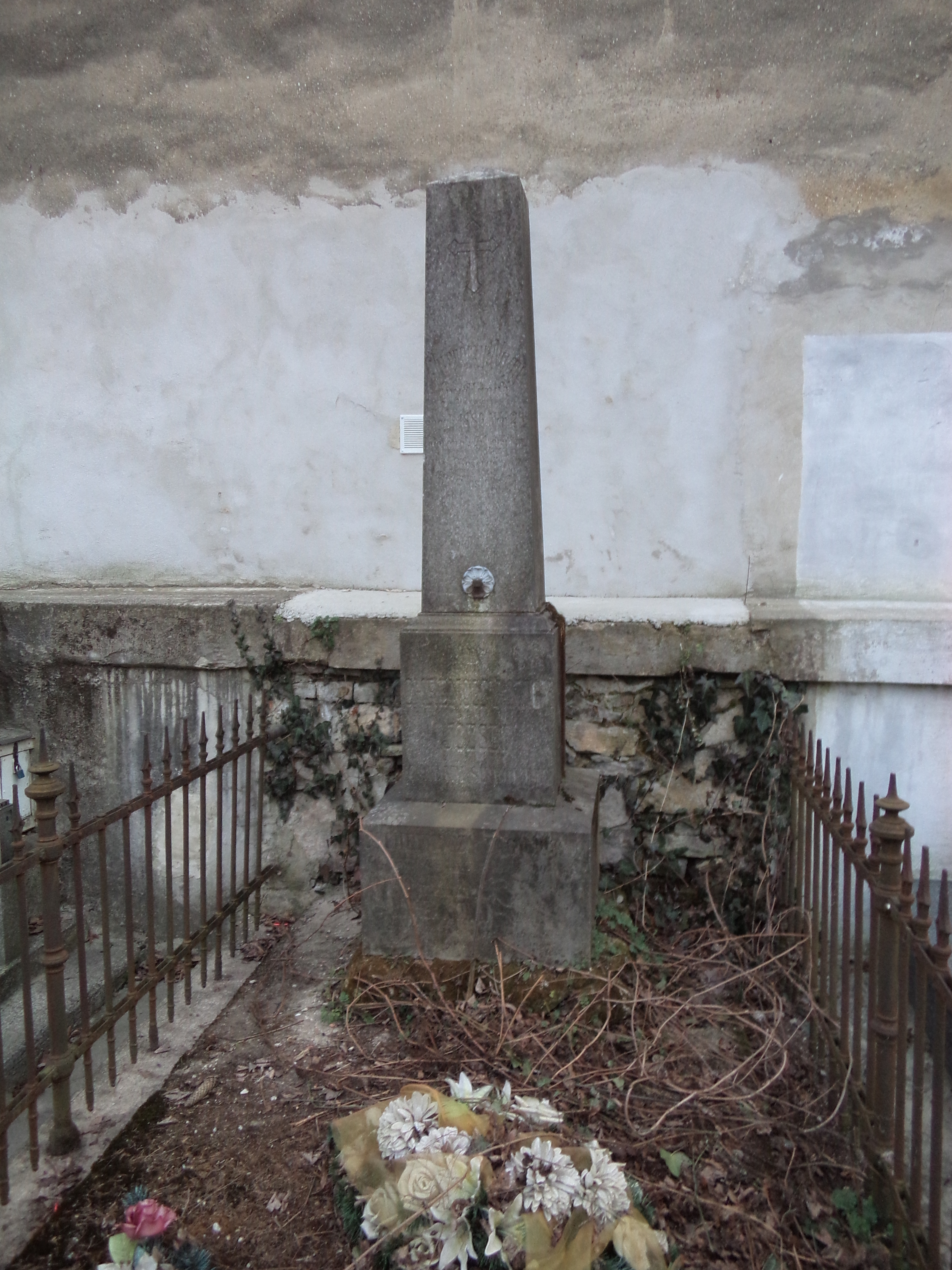 Chrenóczy-Nagy József sírja Nyitra városi temető